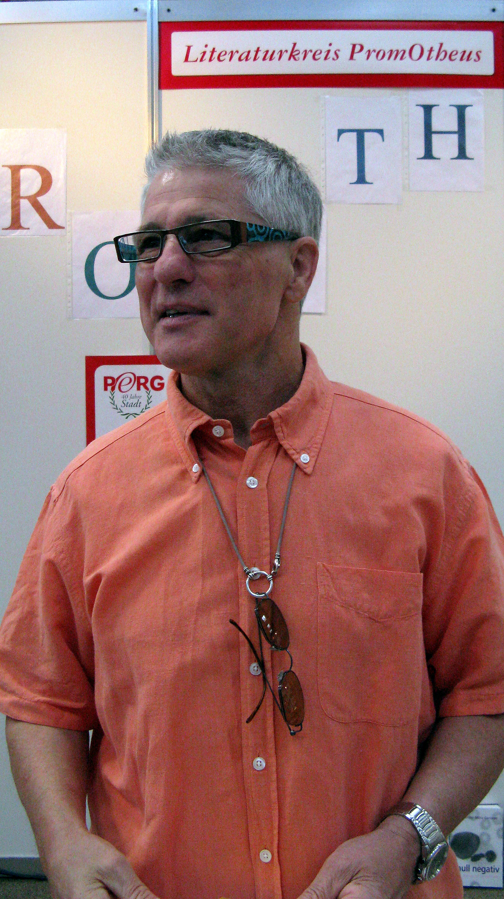 Schriftsteller und P.E.N.-Klubmitglied Günther Maria Garzaner aus Perg